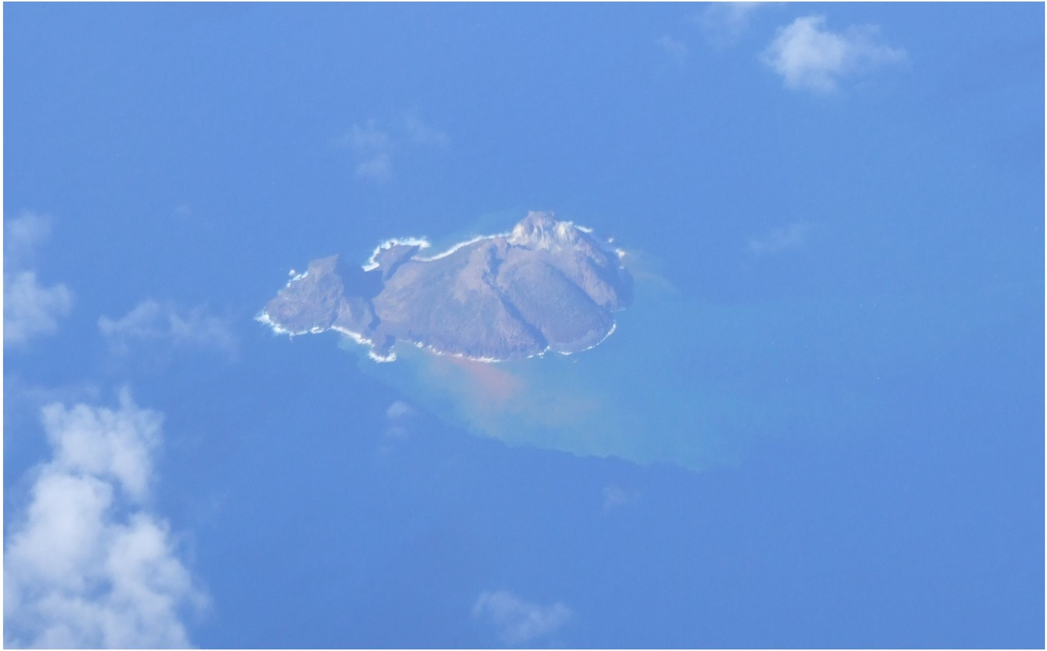 Île Matthew vue d'avion